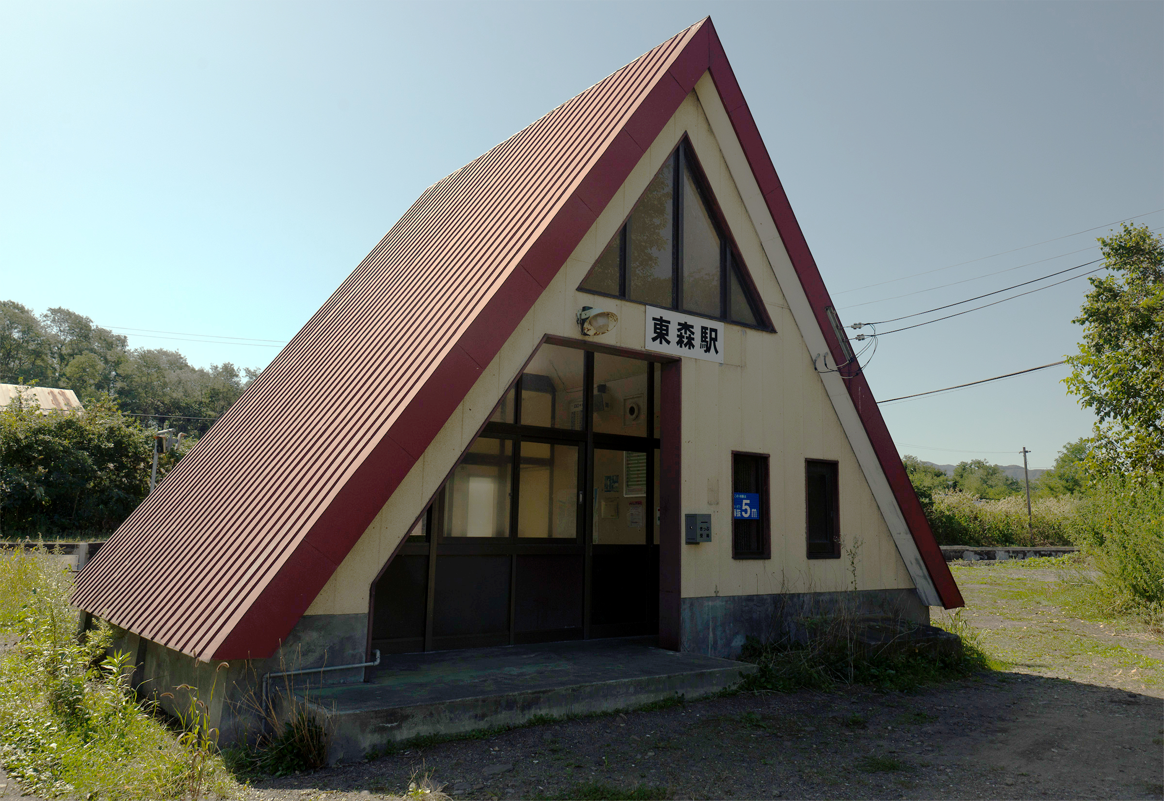 北海道旅客鉄道函館本線東森駅駅舎全景